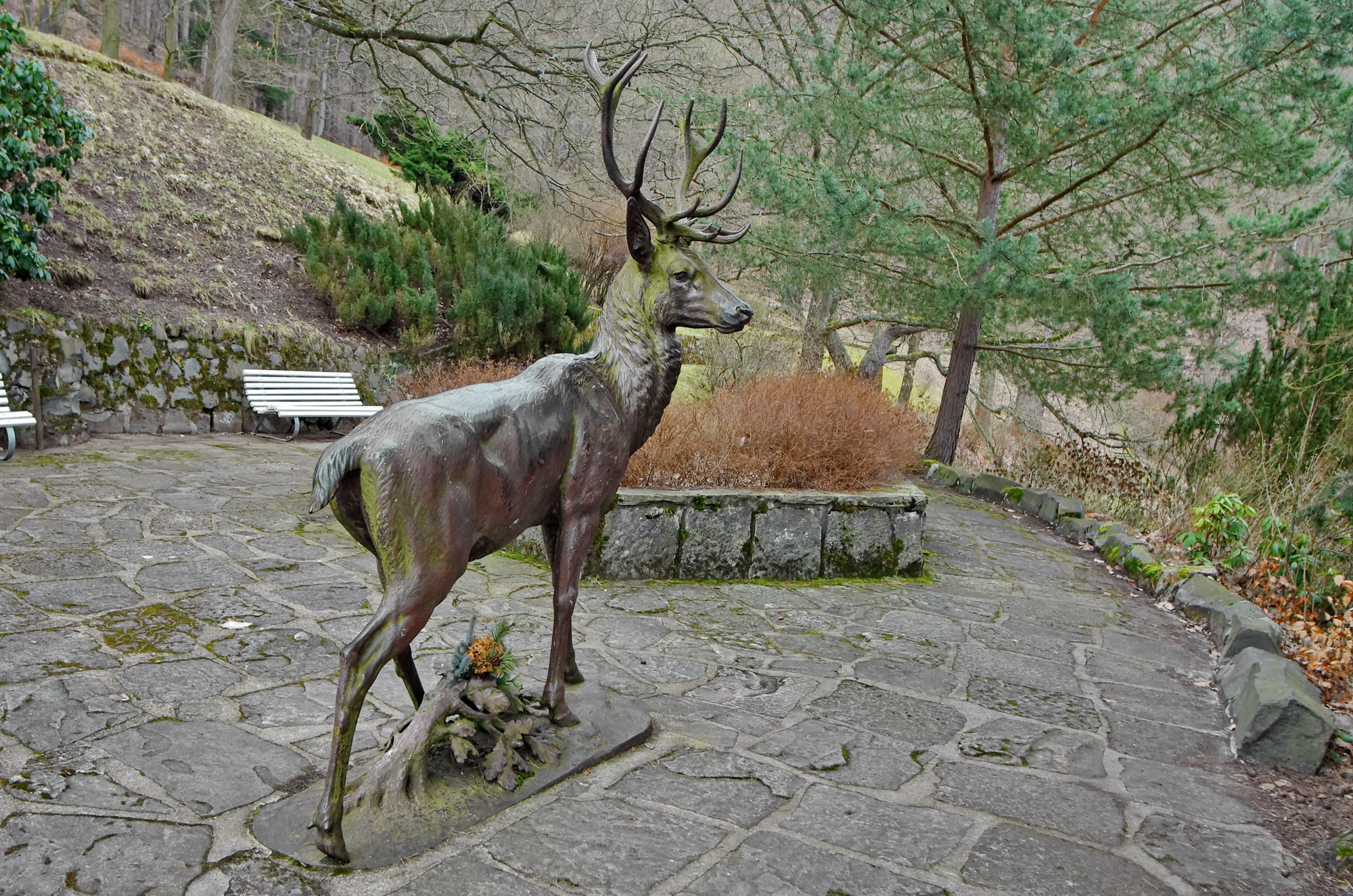 Karlovy Vary, hotel Richmond, litinová plastika jelena v parku nad hotelem Richmond